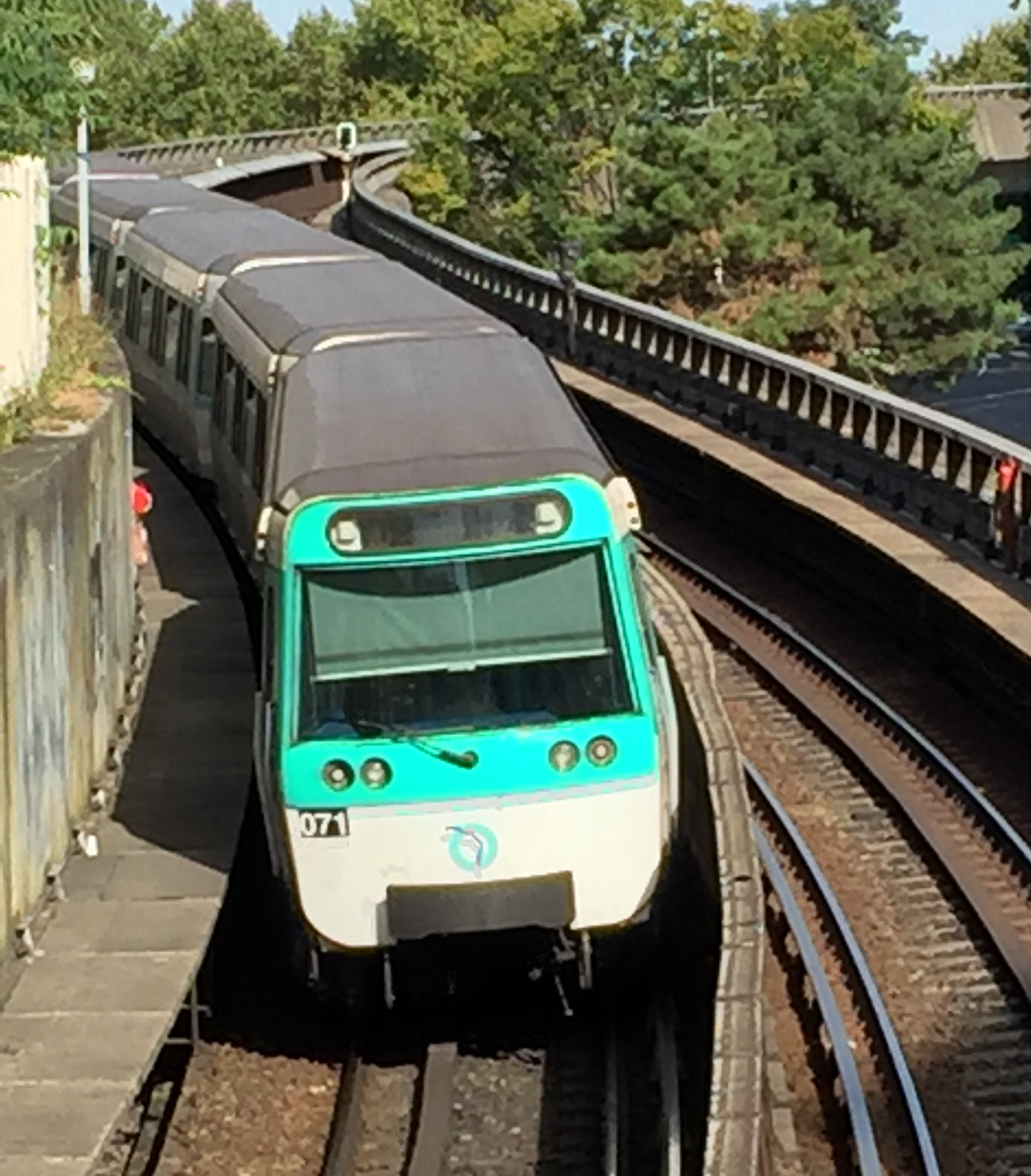 Vue du viaduc de Clichy (franchissant la Seine), pont du métro à la sortie de la station Mairie de Clichy. Une rame approche la station pour entrer à la station Mairie de Clichy.